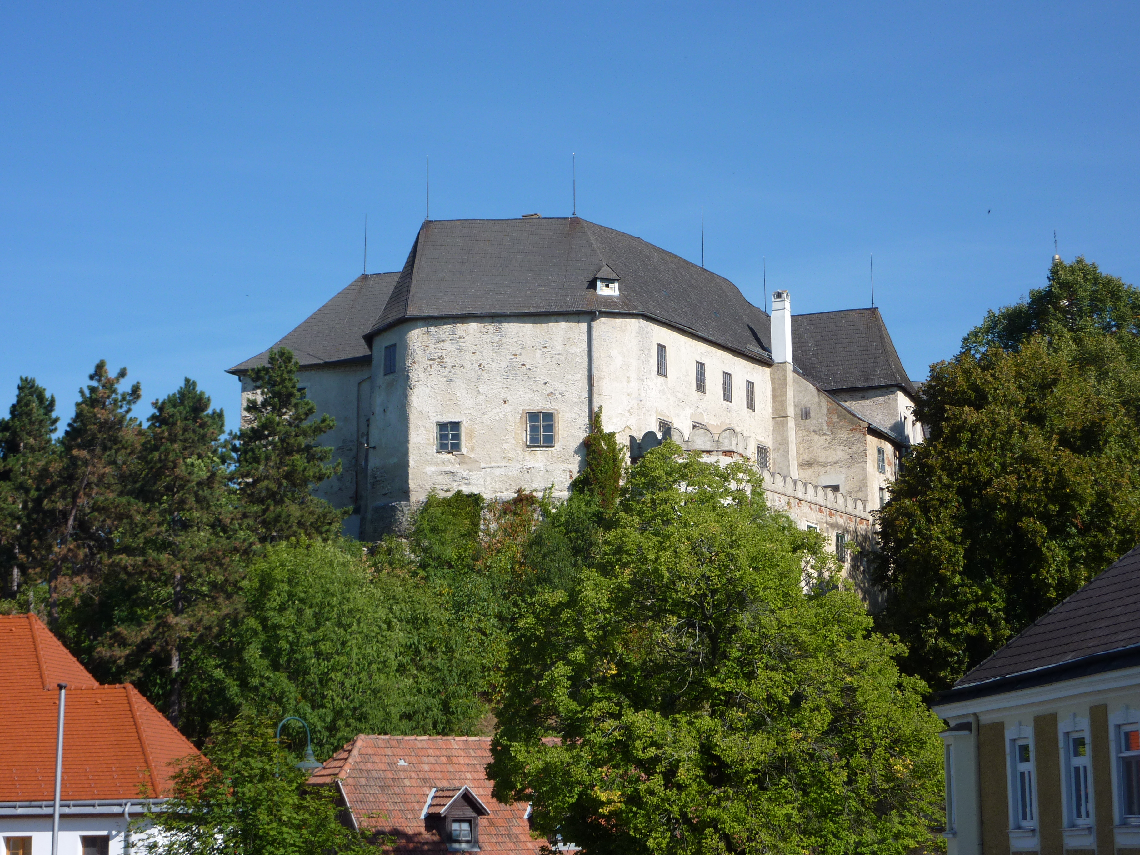 Burg, Albrechtsberg an der Großen Krems, Niederösterreich